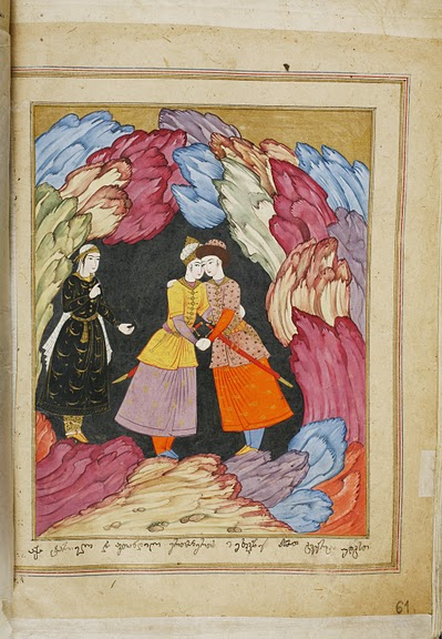 მინიატიურა წერეთლისეული ვეფხისტყაოსნიდან